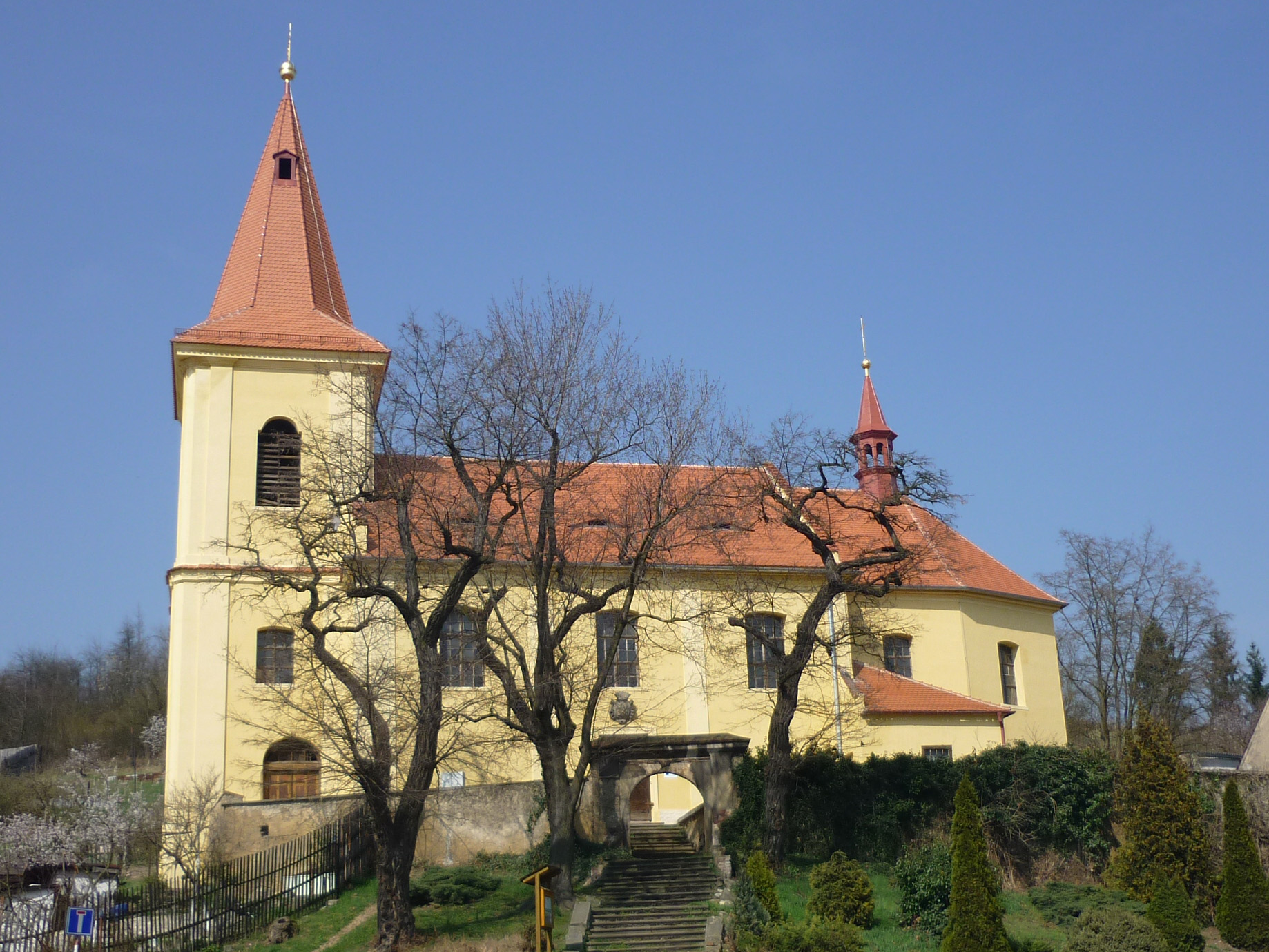 Mariä-Himmelfahrtskirche in Liboritz bei Saaz (Libořice, Okres Louny)